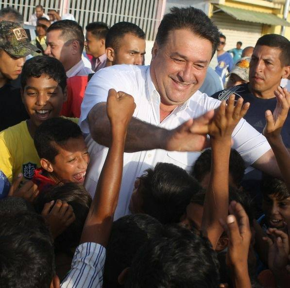 Pedro Loreto